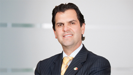 alberto